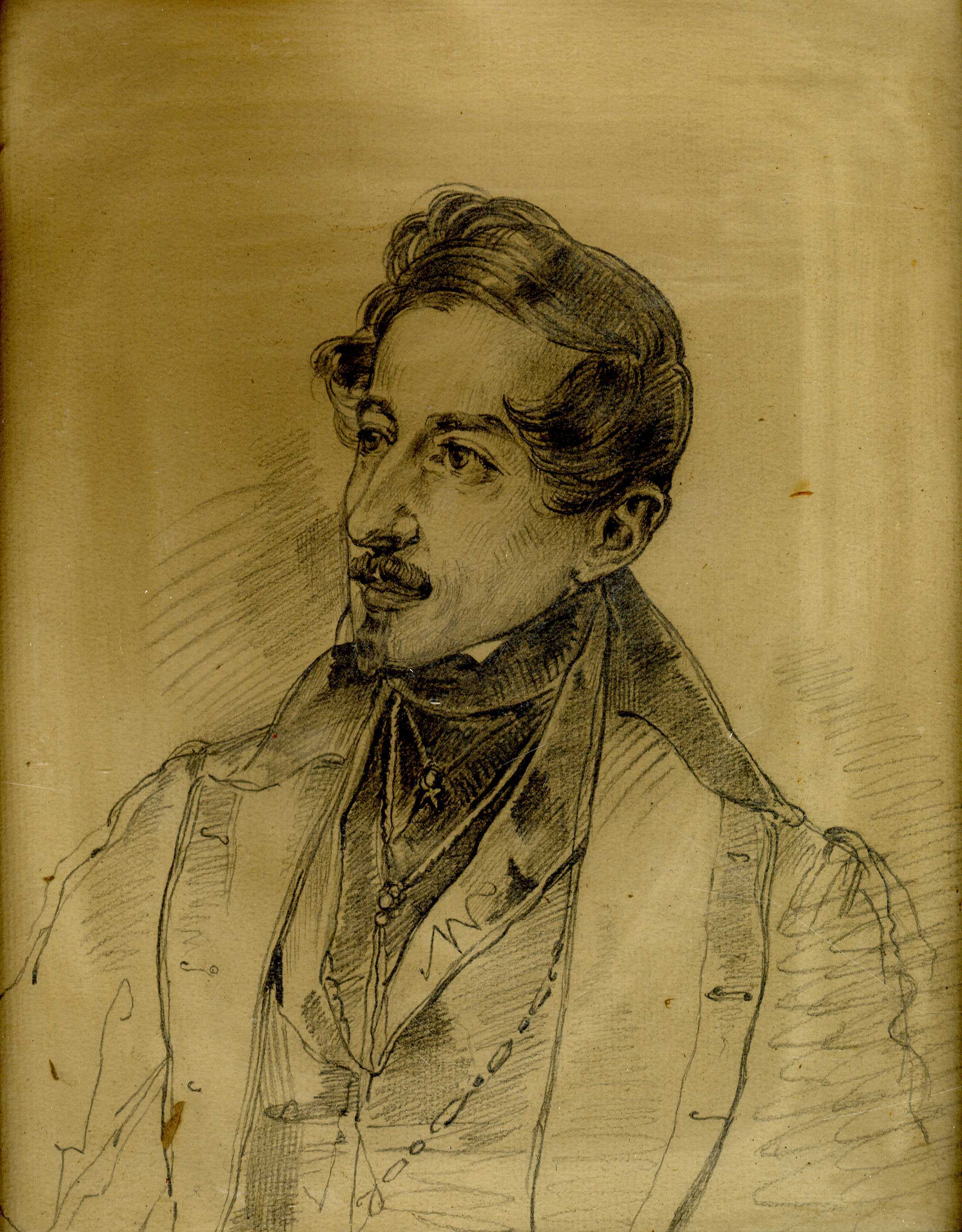 Dibujo de José de Negrete y Cepeda, V Conde del Campo de Alange, realizado por Federico de Madrazo.